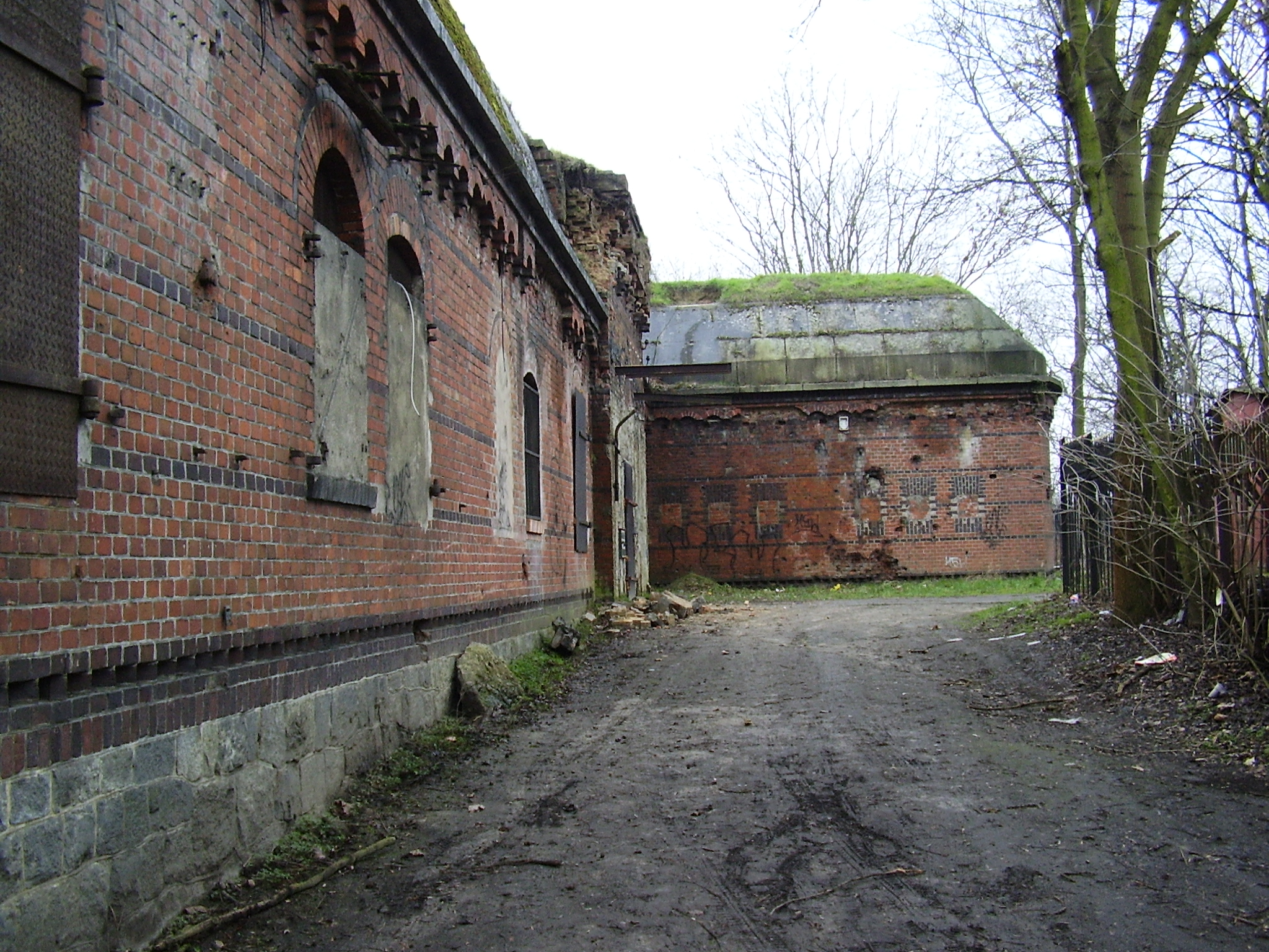 Fort 9a - Poznań